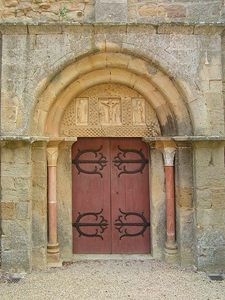 Abbaye Fontfroide, Abteikirche, Westportal